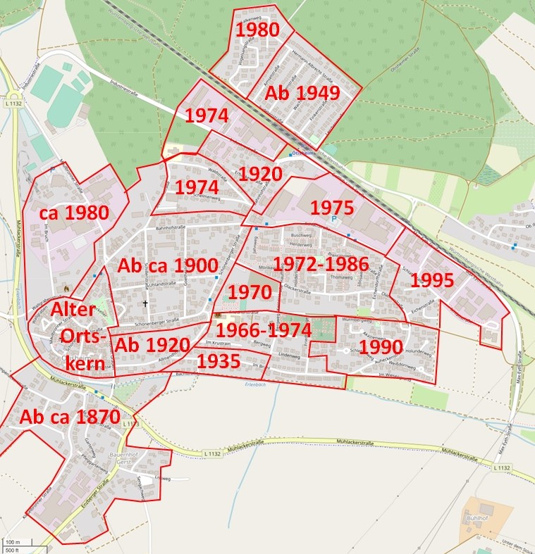 Siedlungsentwicklung der Gemeinde Ötisheim (OpenStreetMap)